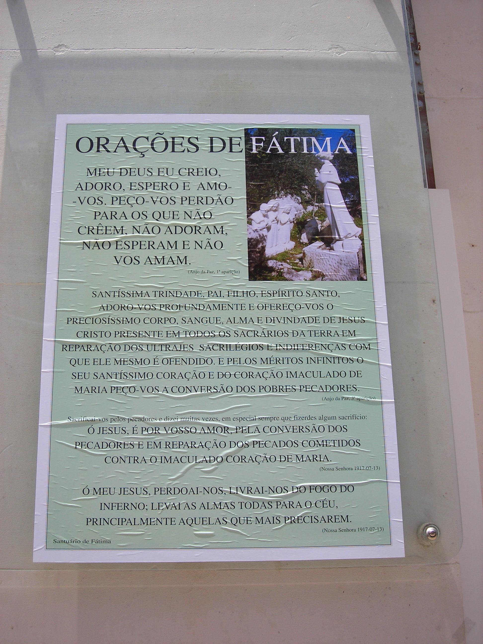 Fátima